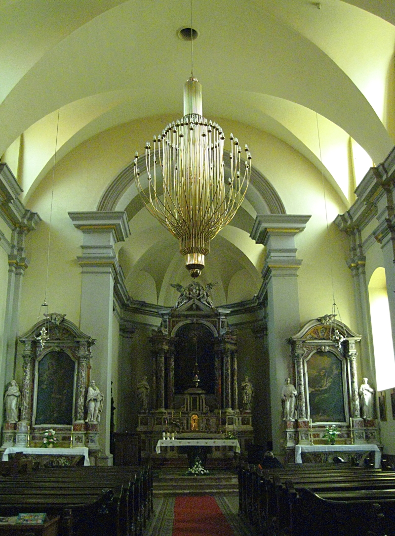 Crkva Svetog Jeronima u Rijeci